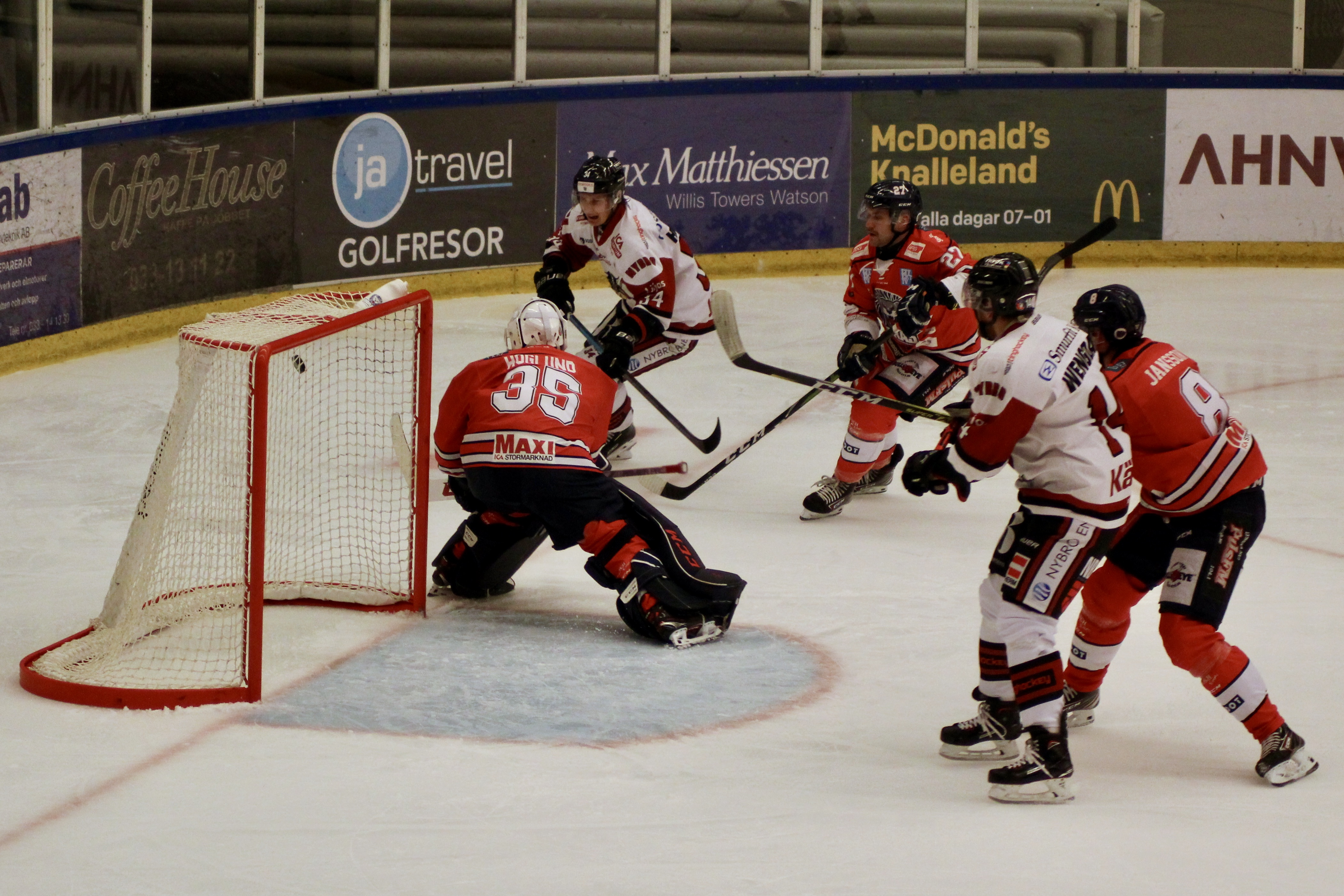 Matchdata på